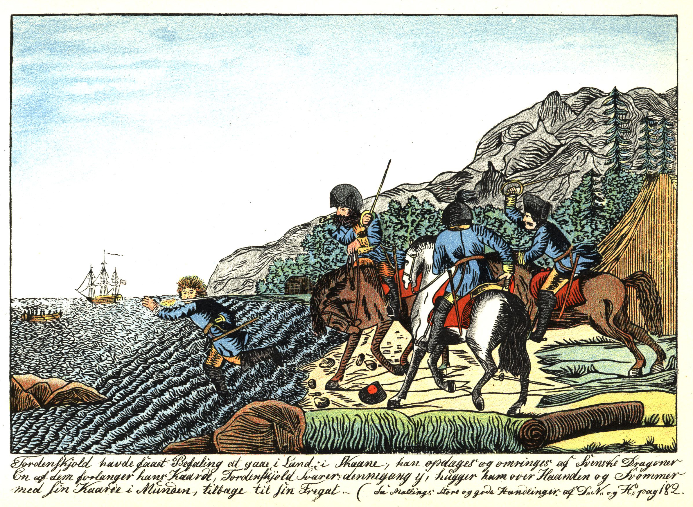 Wood engraving depicting Peter Wessel Tordenskjold (1690-1720). Text in Danish: "Tordenskjold havde faaet Befaling at gaae i Land i Skaane; han opdages og omringes af Svenske Dragoner. En af dem forlanger hans Kaarde, Tordenskjold Svarer: dennegang ej, hugger ham over Haanden og Svömmer med sin Kaarde i Munden, tilbage til sin Fregat."